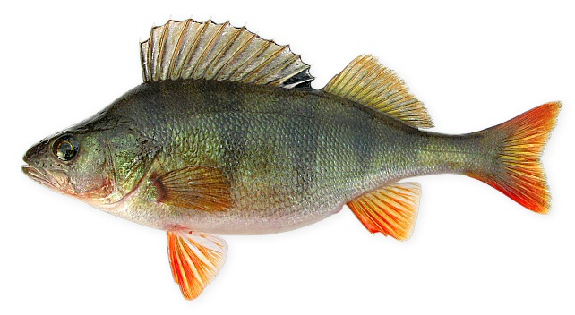 European Perch. Female, 20 cm TL. Siverskiy Donets River, Petchenezhskoe Reservoir, Kharkiv Region, Ukraine, captured 12 January 2008